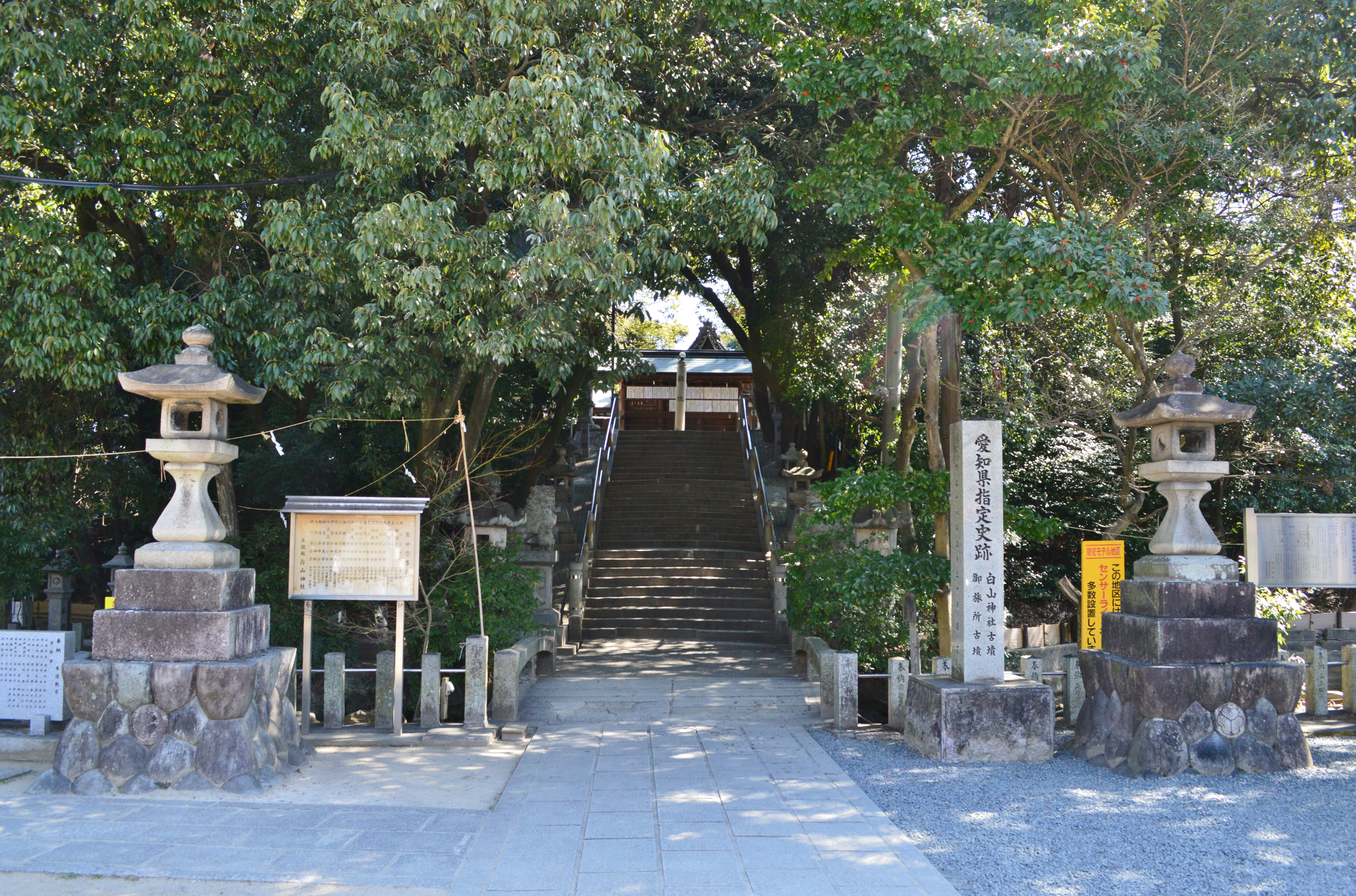 白山神社 (春日井市二子町) 参道 (味美白山神社古墳 前方部正面)